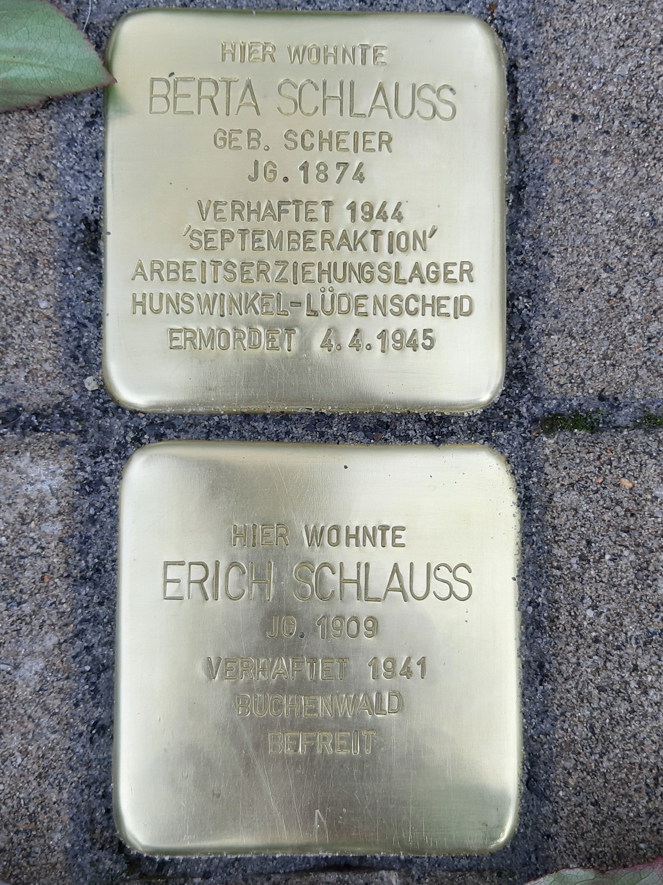 Kunigundenstraße 26 Schlauß Berta und Erich